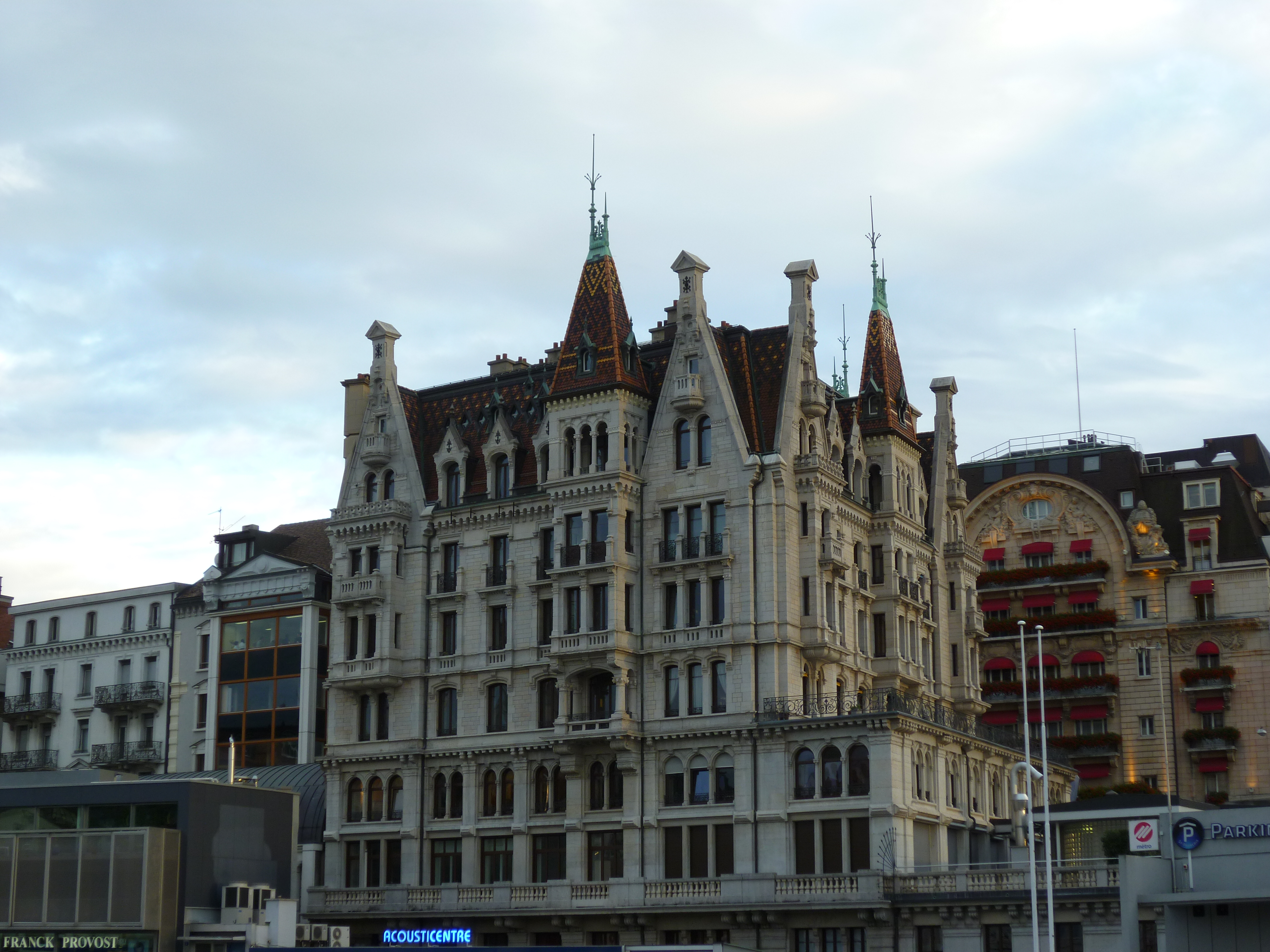 Immeuble d'habitation et de bureau à Lausanne